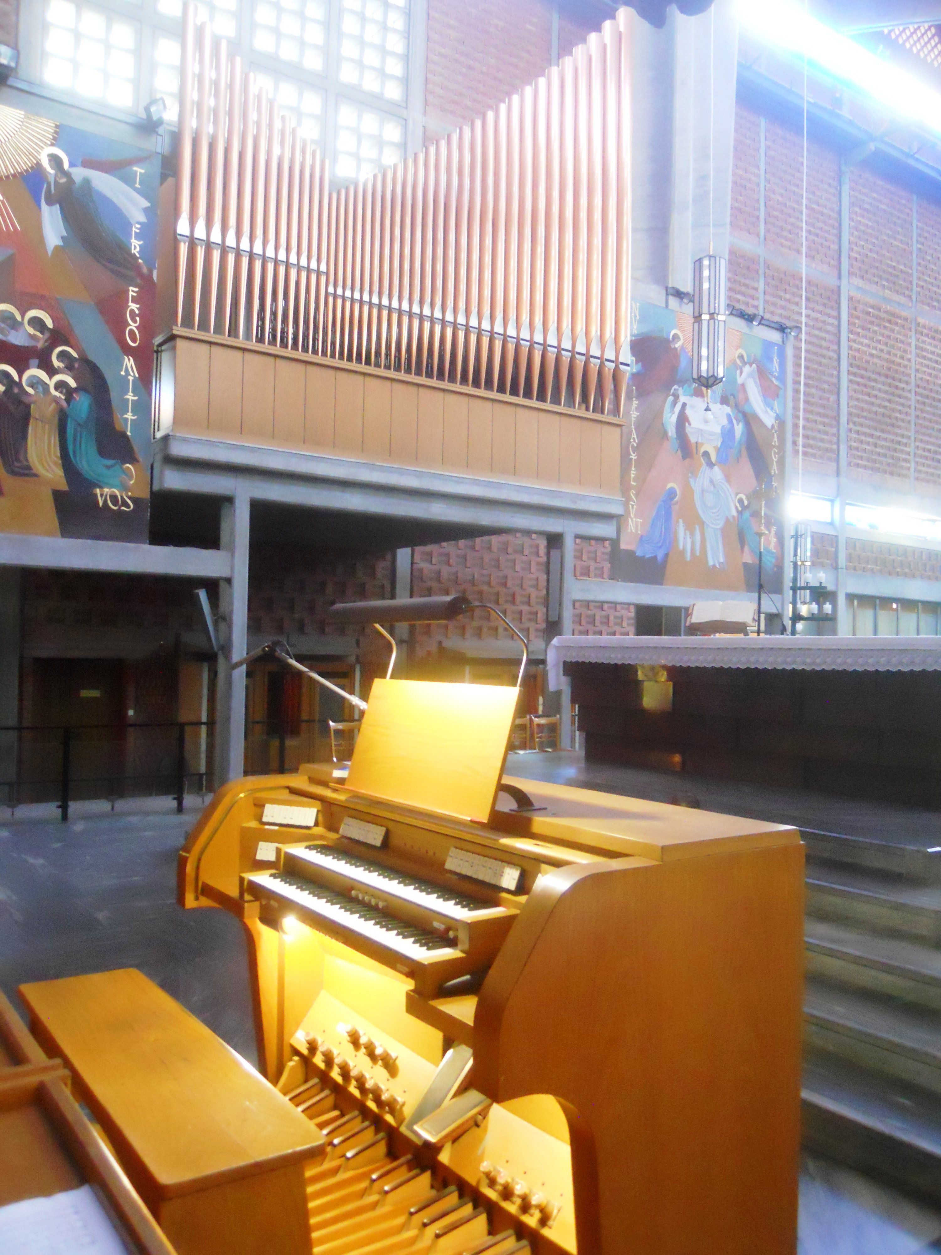 Mascioni opus 1058 (II+P/30)